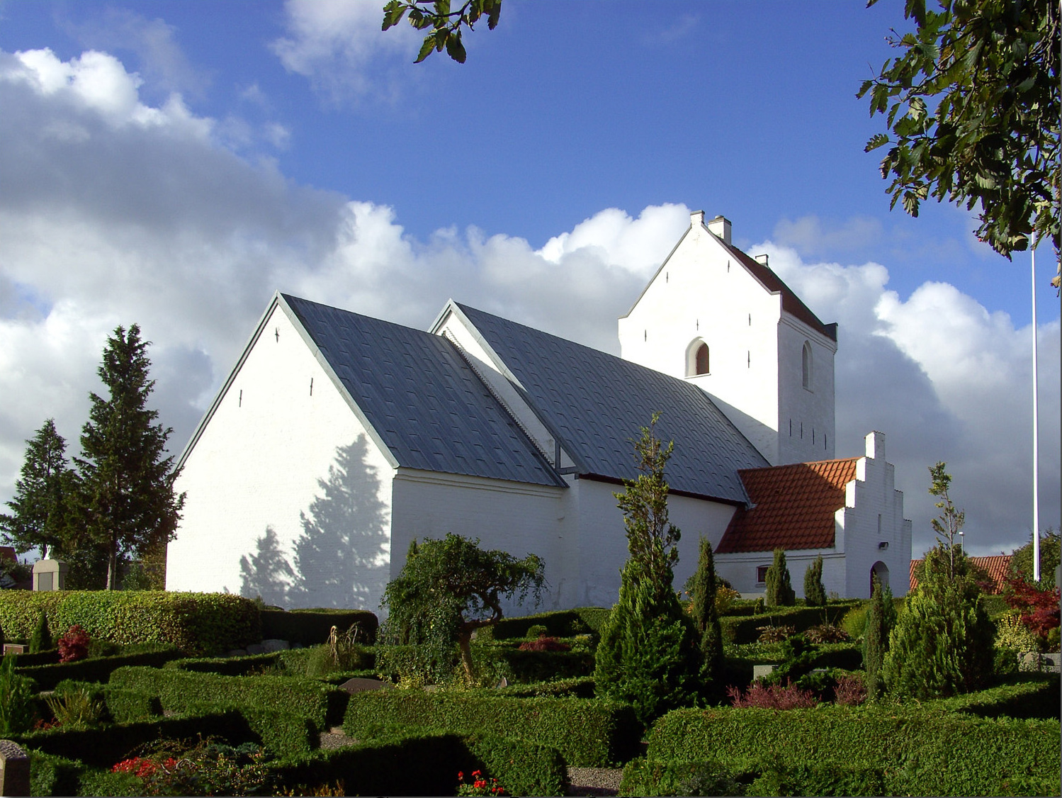 fra nordøst